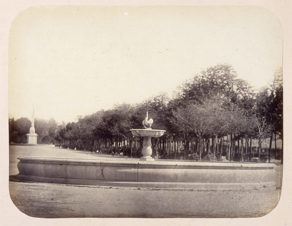 Fuente del Cisne en el Paseo de la Castellana, Madrid. Obra en 1864 del fotógrafo toledano Alfonso Begué, muerto el 31 de octubre de 1865. Cartulina sepia. Albúmina. 43 x 32 cm. Fotografía contenida en un álbum procedente del Archivo de Villa y trasladado al Museo de Historia en 1983.